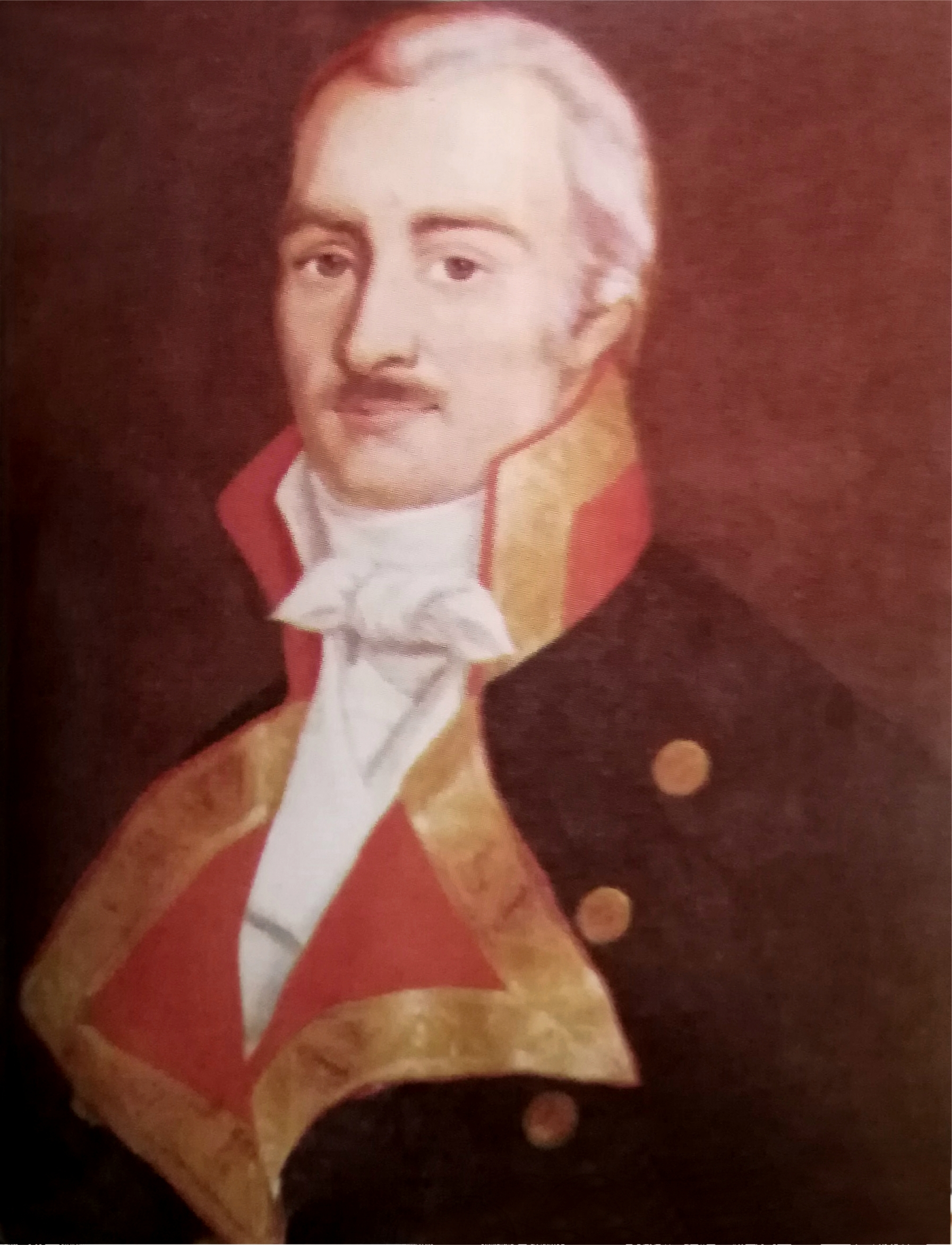 Retrato imaginado del Tnte. Gral. Joaquín de Molina, presidente de la Real Audiencia de Quito entre 1810 y 1812.